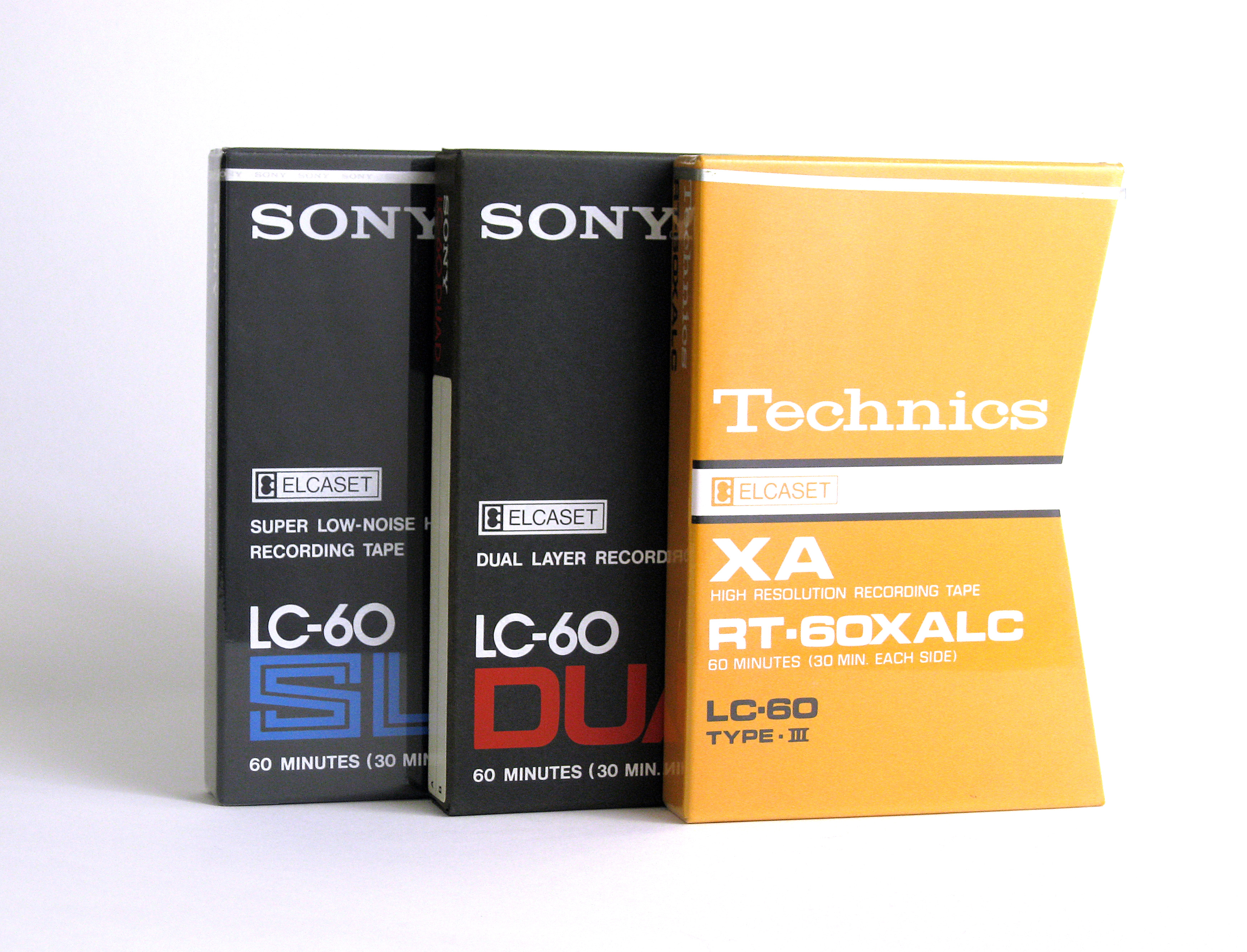 ELCASETテープ 3種類のケース外観（左からType-I,Type-II,Type-III）